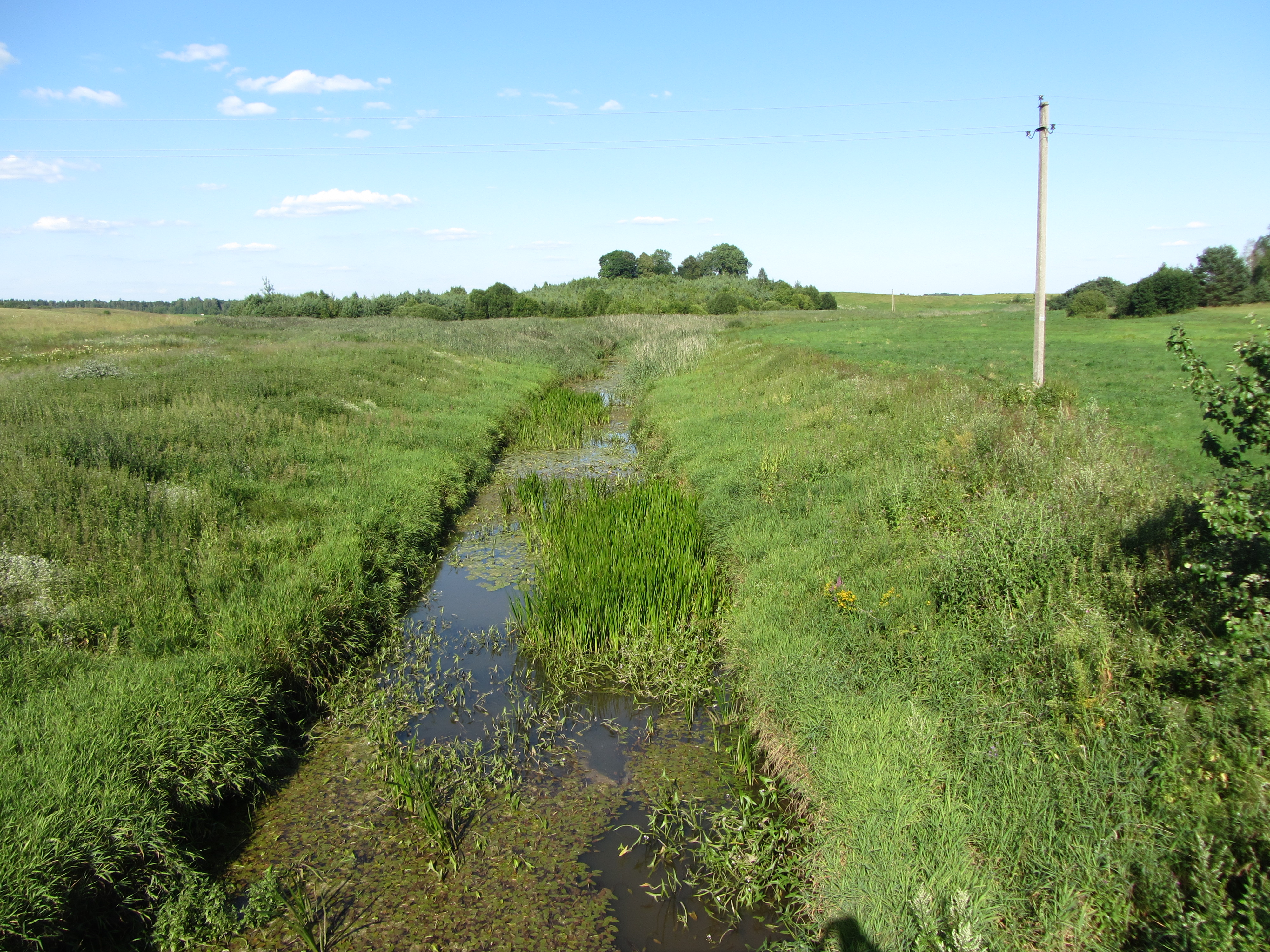 Alionių sen., Lithuania